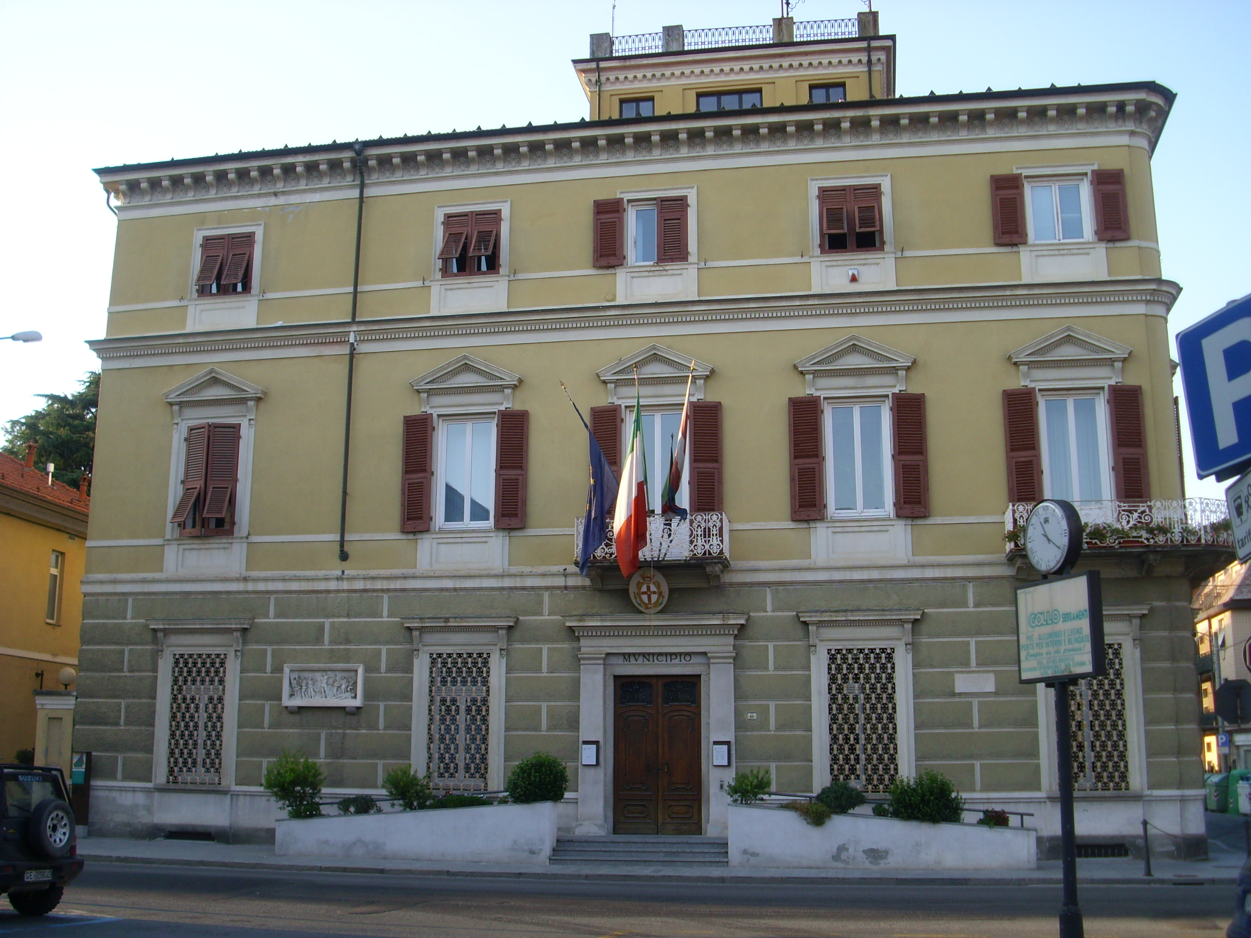 Il municipio di Ovada